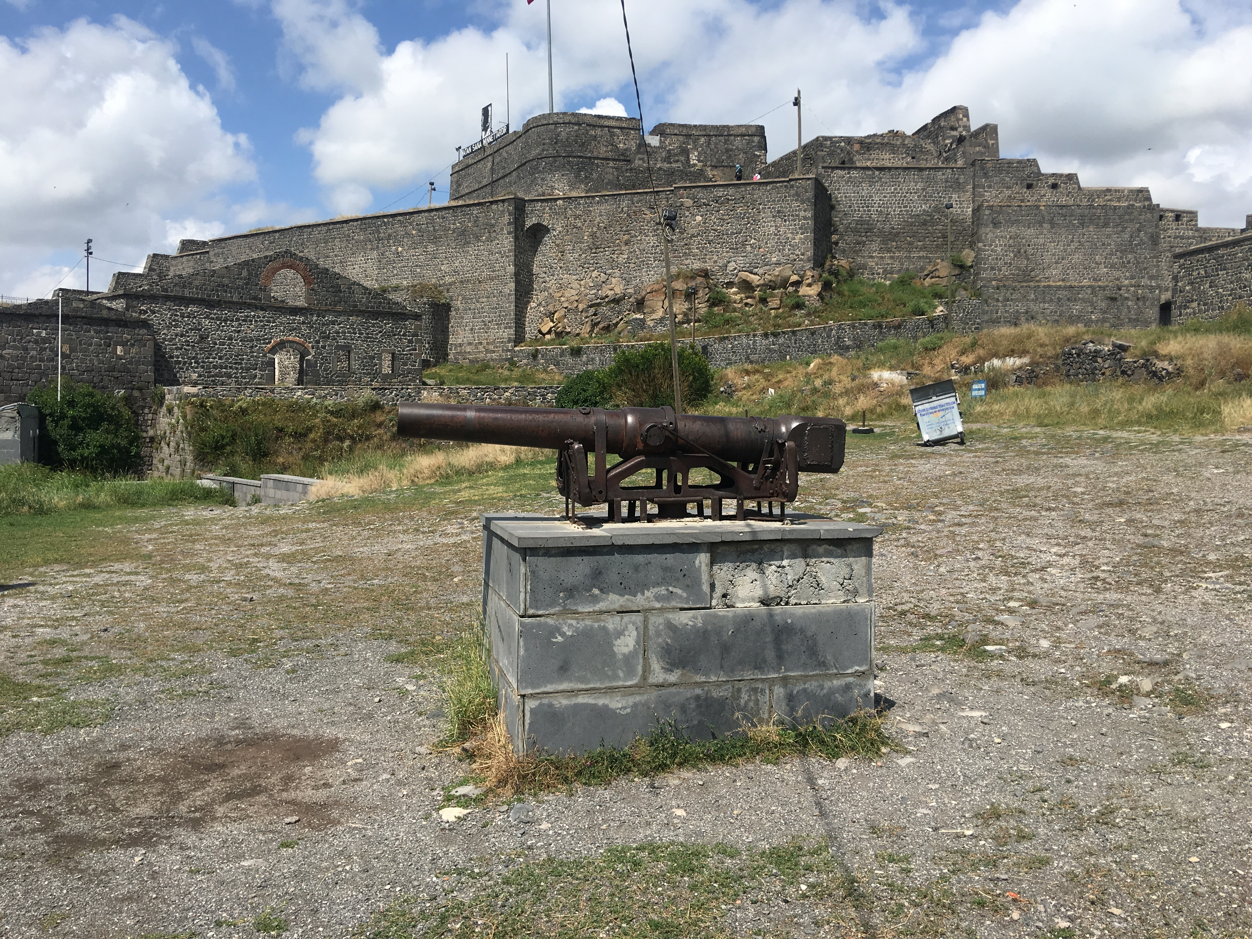 Կարսի բերդ